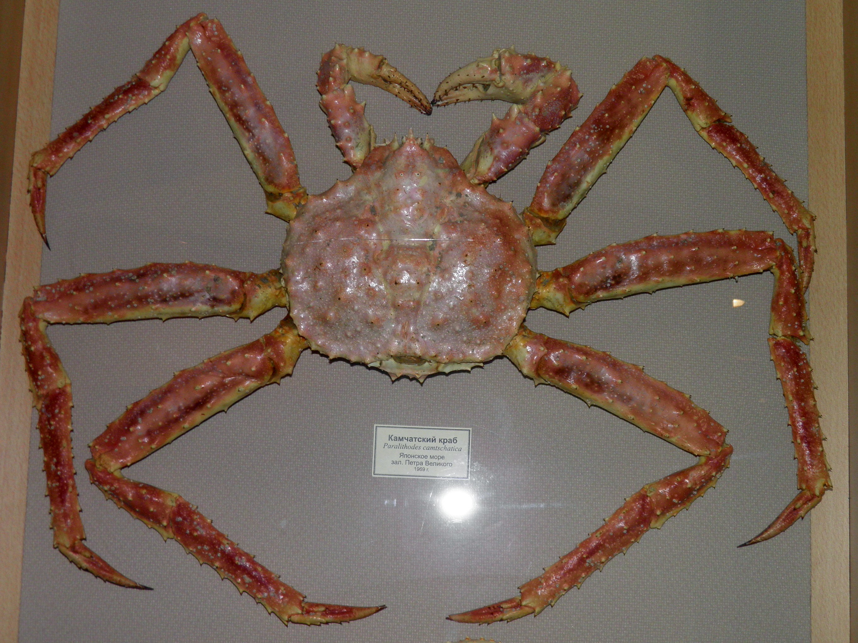 Камчатский краб (Paralithodes camtschaticus) в Научном музее ДВФУ (г. Владивосток)